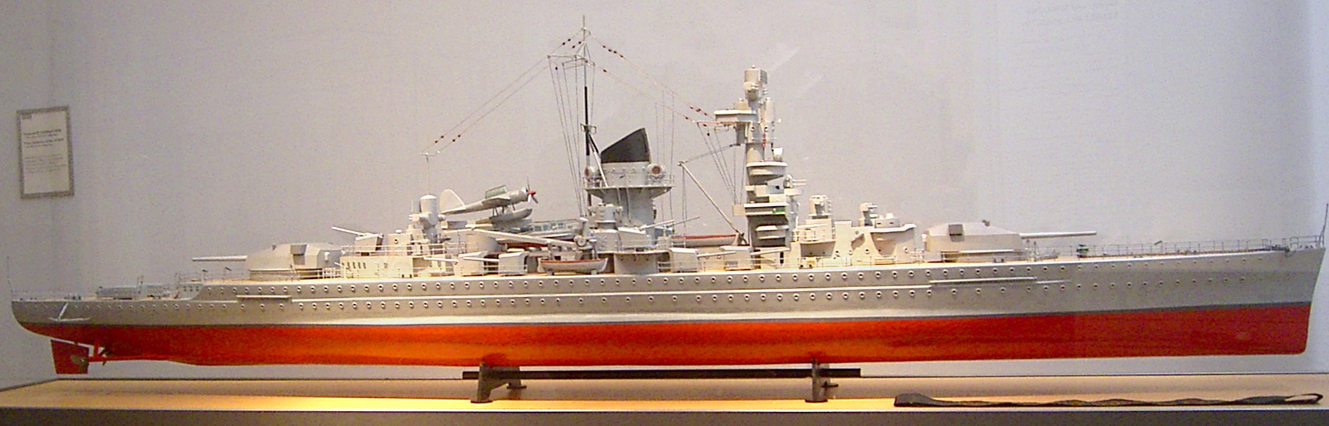 Modell des Panzerschiffes "Admiral Scheer" im Maßstab 1:100. Ausgestellt im Deutschen Marinemuseum in Wilhelmshaven Der Kontrast und Farbe wurden in einer Bildnachbearbeitung verstärkt und Reflexe auf der Vitrine retuschiert.